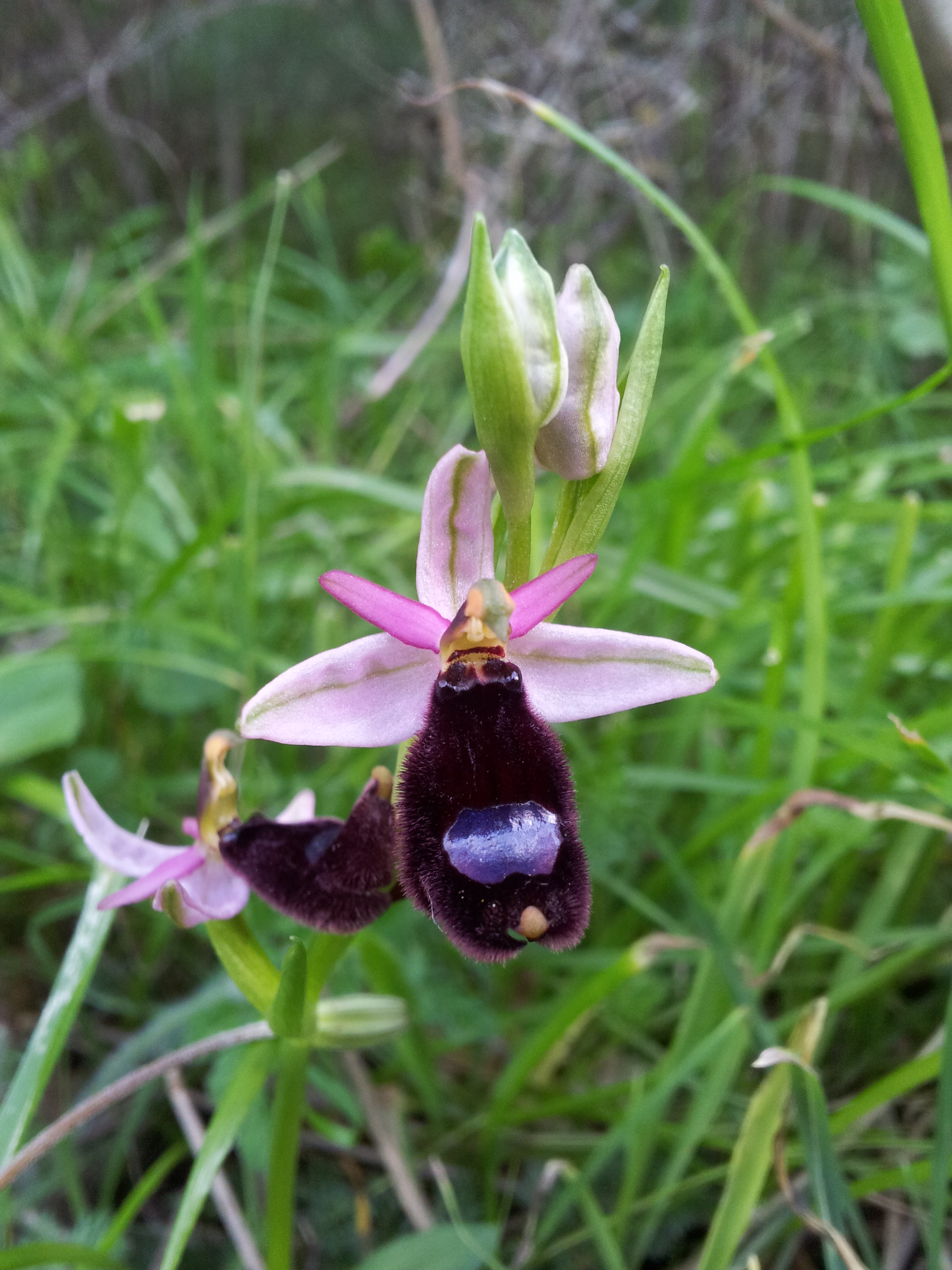 Ophrys Bertolonii - Bosco di Ficuzza (Pa)